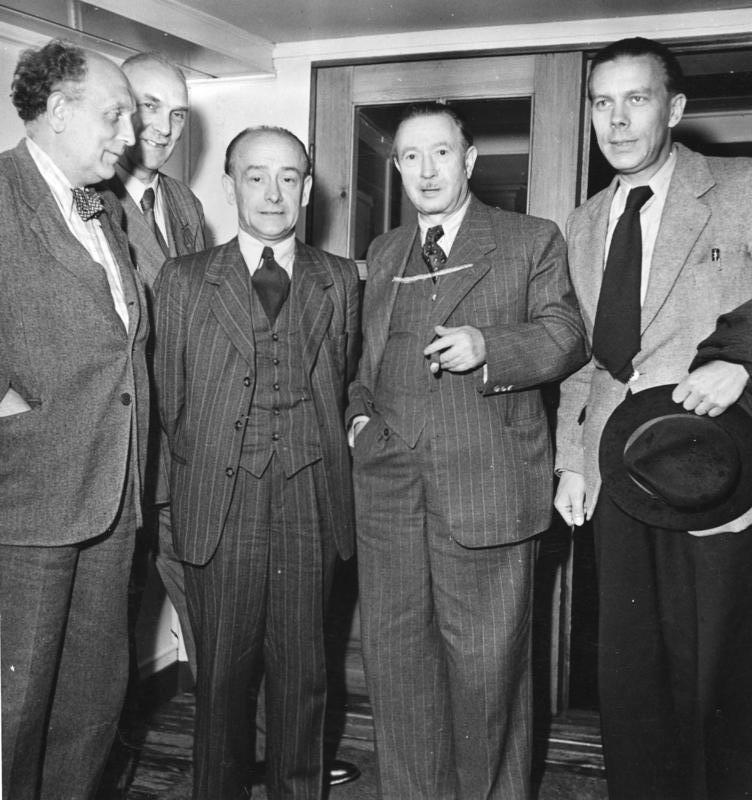 Aufbauminister in Hamburg Sofortprogramm für 150 000 Wohnungen. In einer Entschliessung zur Finanzierung des sozialen Wohnungsbaus halten die Aufbauminister der Westzone und Westberlins, die am 10. und 11. Juni 1949 in Hamburg tagten, den sofortigen Bau von 150 000 Wohnungen in der Doppelzone für moeglich. Hierfür wären 1,5 Milliarden Mark erforderlich, die in Form einer Wohnungsabgabe aus dem kleinen Lastenausgleich und aus den Haushaltsmitteln der Länder abgezweigt werden könnte. Unser Bild zeigt die Aufbauminister in Hamburg. V. l. n. r.: Oberbaudirektor Meier-Ottens (Hamburg) - Minister Wittstock (Niedersachsen) - Minister Heinrich Zinnkann (Hessen) - Minister Steinhoff (Nordrhein-Westfalen) und Stadtrat Niklitz (Berlin). 11-6-49 dpd